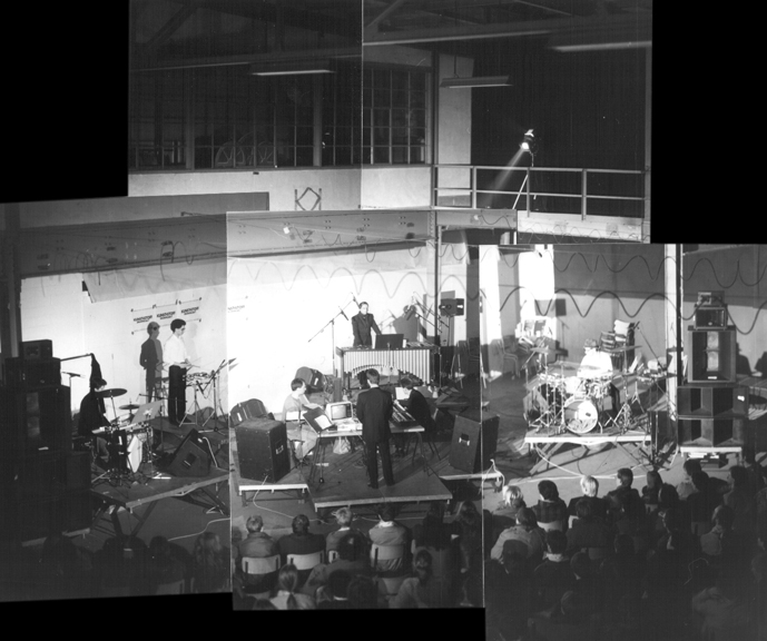 Collage von Einzelaufnahmen der Konzertreihe "Neue Töne" 1985 im zakk. Es spielt das "Kunst-Stoff Drum-Projekt" unter der Leitung von J.U. Lensing